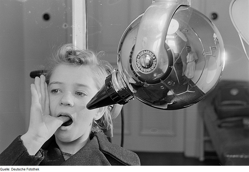 Original image description from the Deutsche Fotothek Portrait eines Kindes beim Röntgen